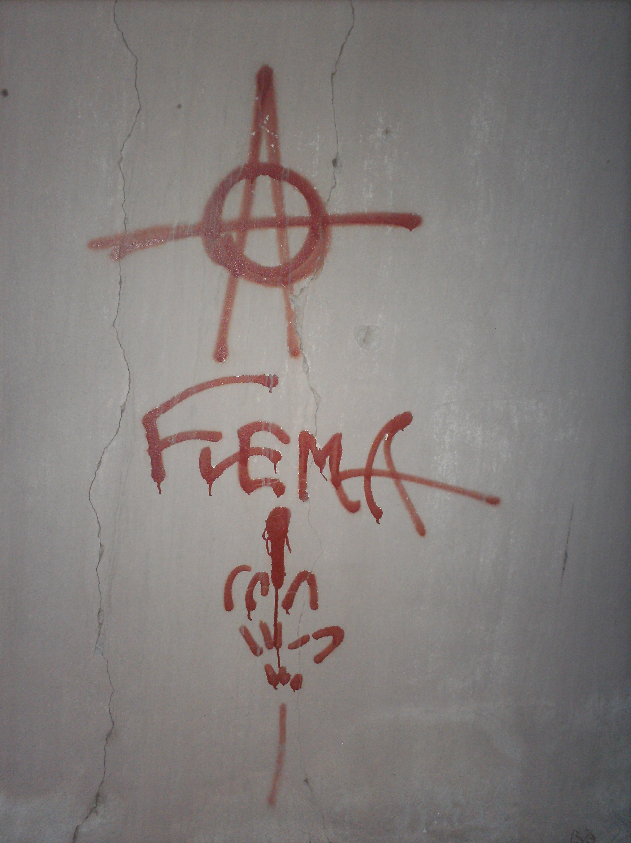 El nombre de la banda, escrito en una pared, en Mendoza.